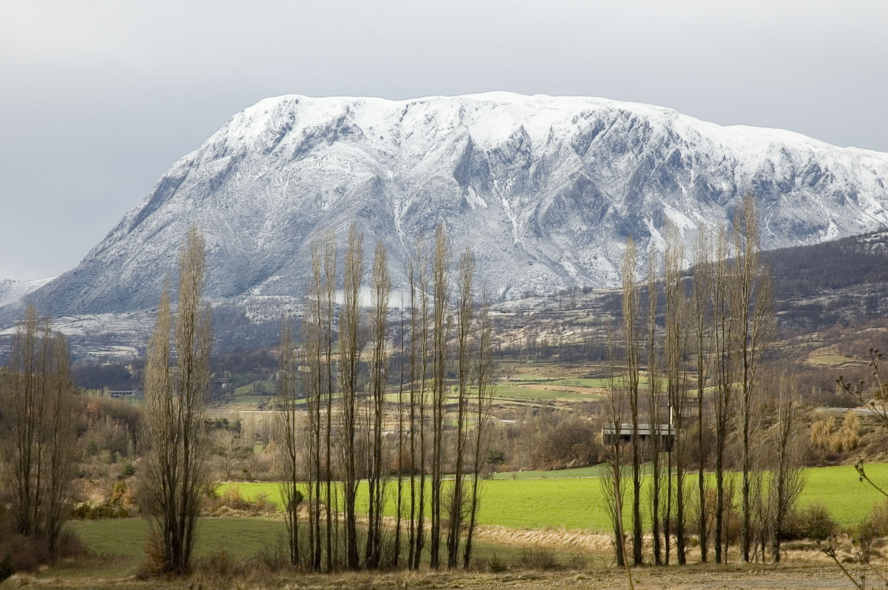 El Turbó és un massís dels Prepirineus, a la comarca de la Ribagorça, que té el seu cim a 2.492 metres. Està format per un gran anticlinal fallat en el seu flanc est i modelat fonamentalment en margues i potents bancs calcaris d'edat cretàcica. La fotografia mostra el vessant sud Guía Repsol, Torre La Ribera